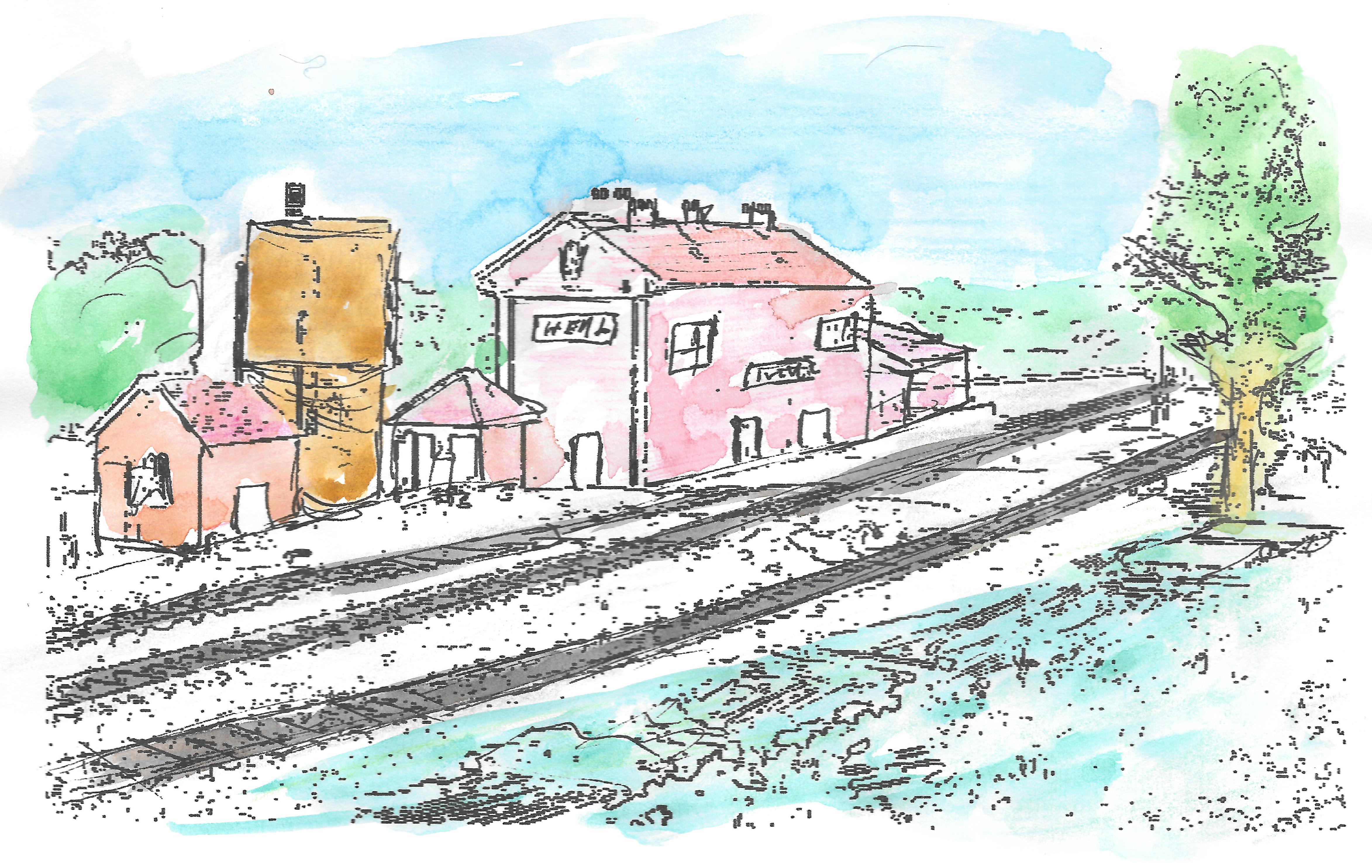 Peinture Gare